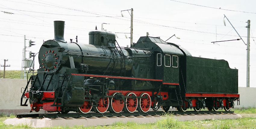 Паровоз серии Эр в локомотивном депо Петров Вал